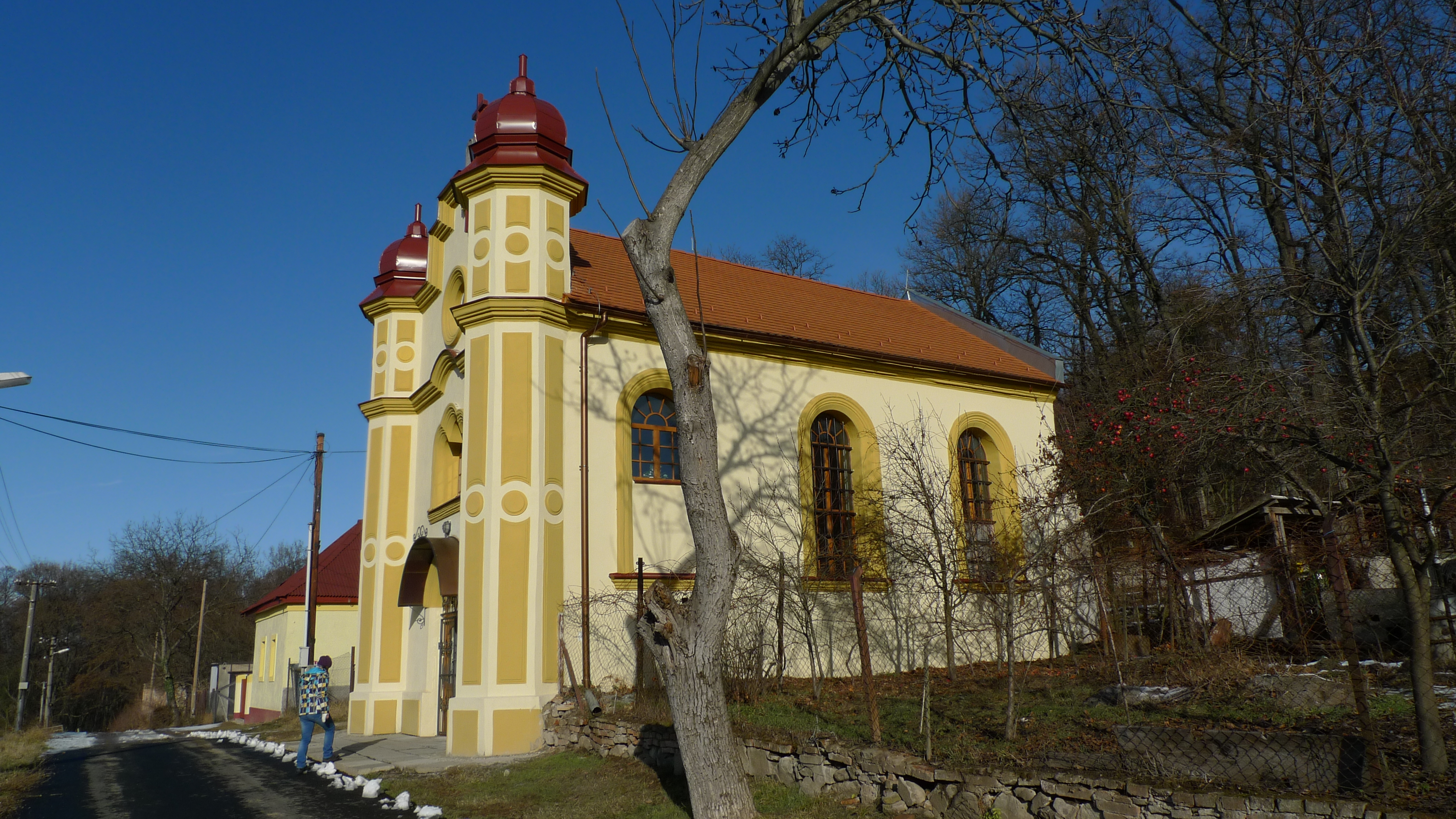 SYNAGÓGA